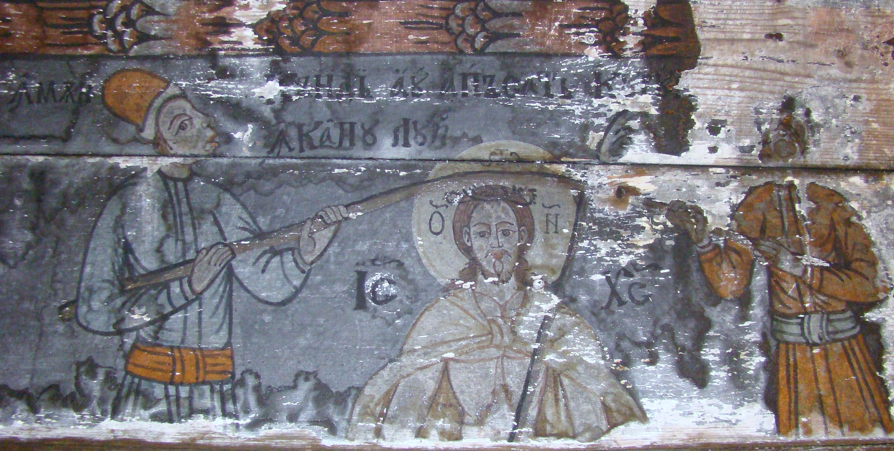 Biserica de lemn din Straja, județul Cluj